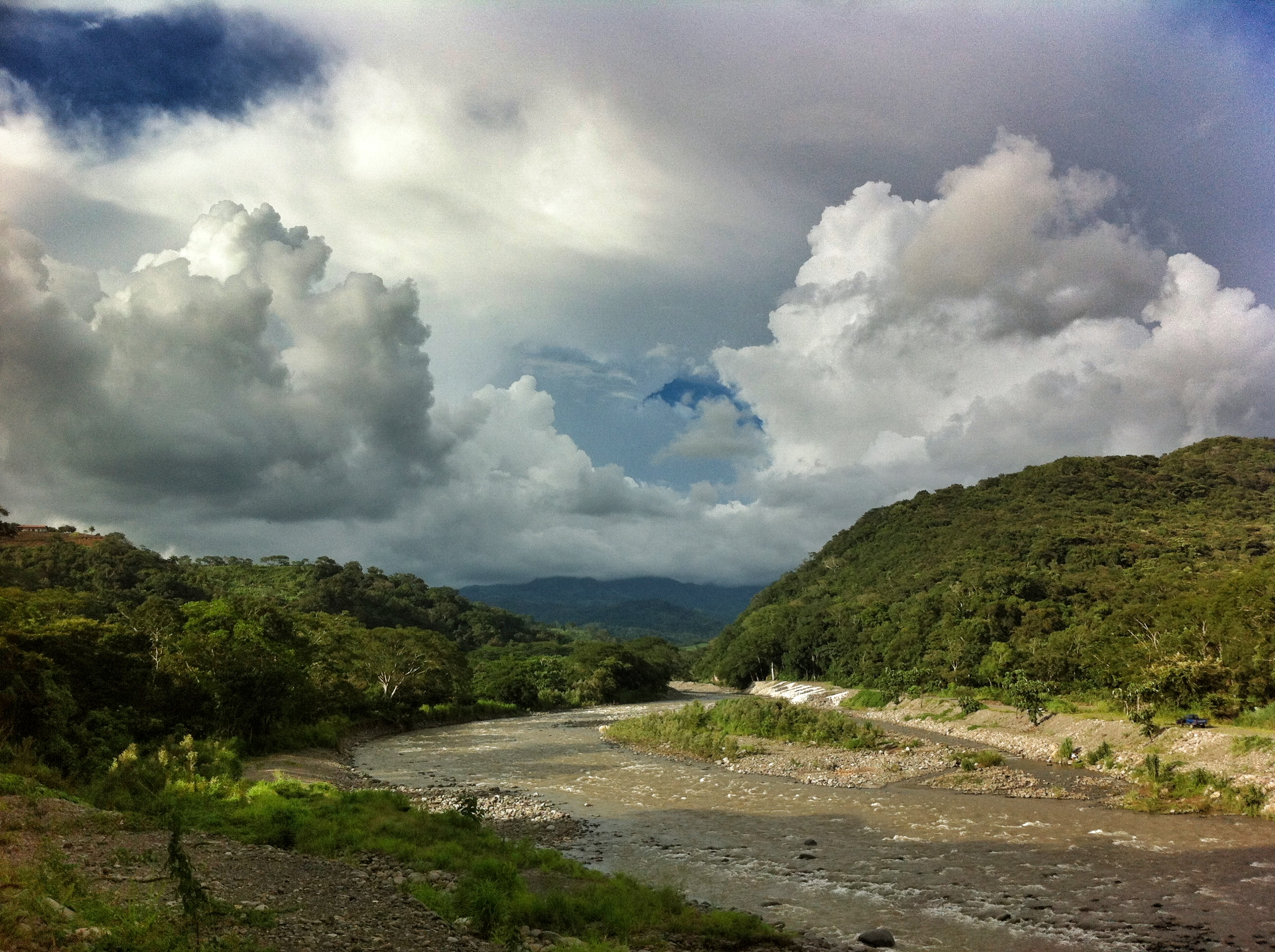 Rio Barranca